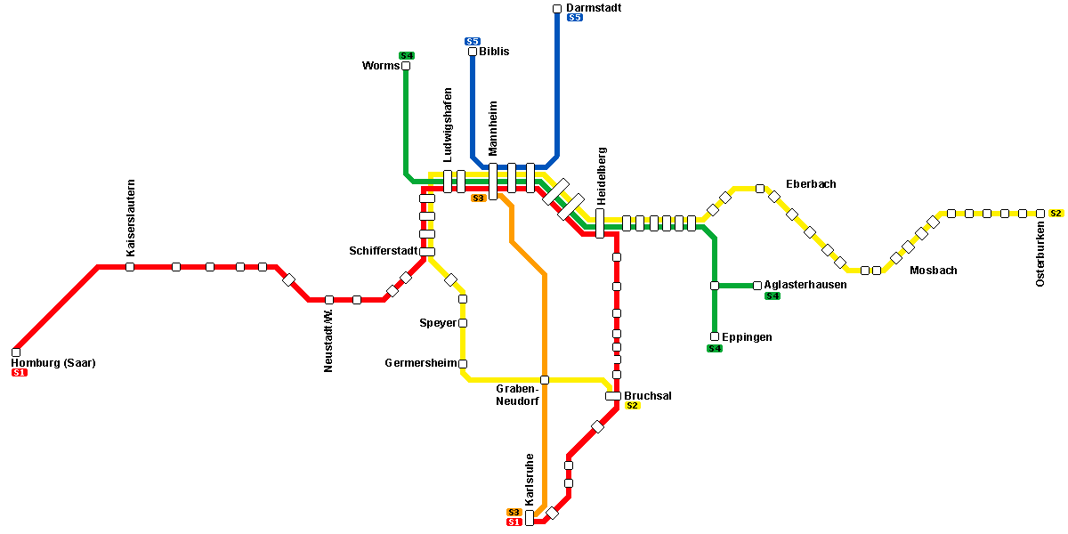 Bildbeschreibung: geplanter Ausbau der S-Bahn RheinNeckar. Zeichner: Karte selbst gezeichnet von WikiNight Datum: 23.2.2006